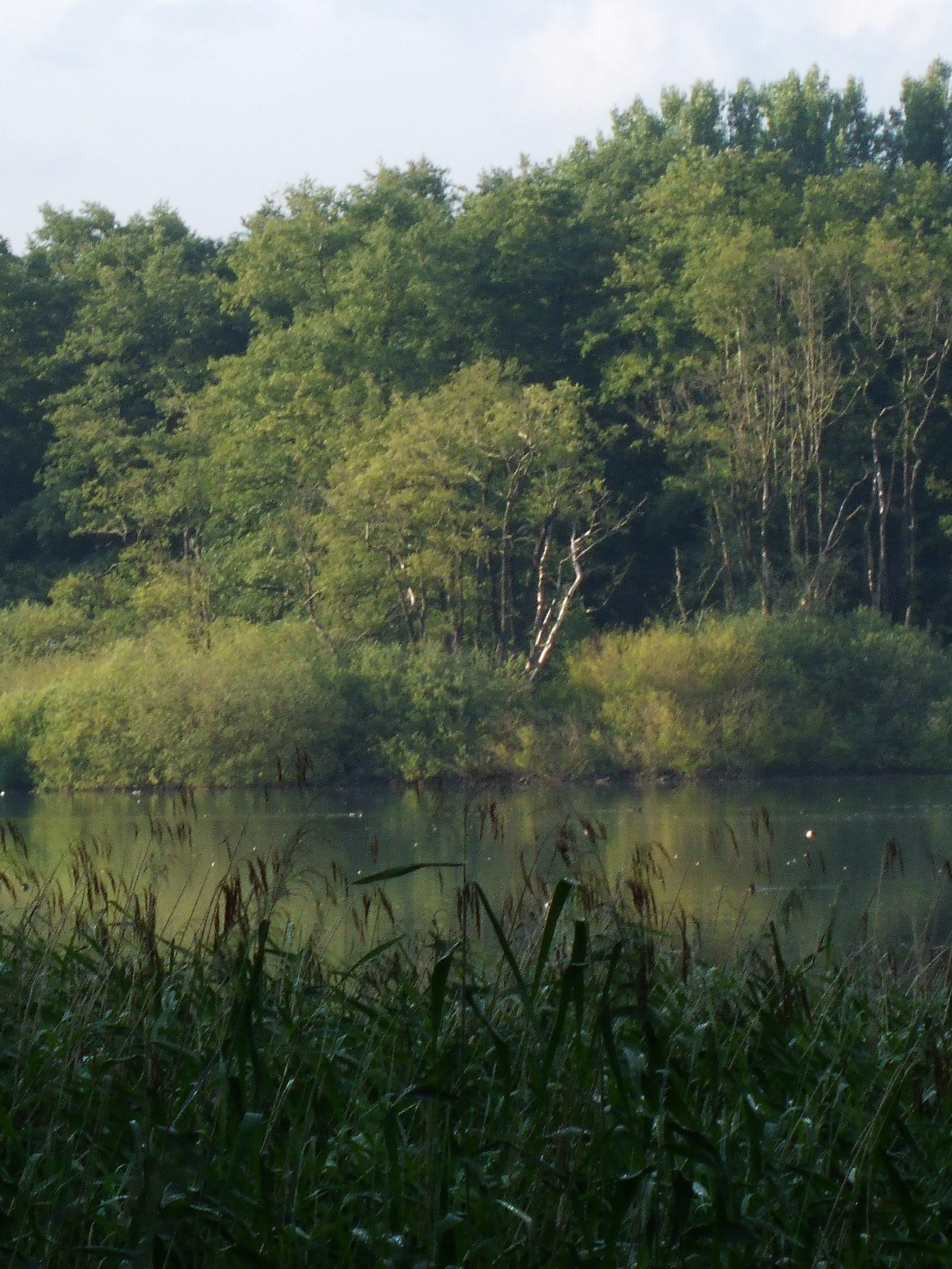 Baumgruppe am Nordufer